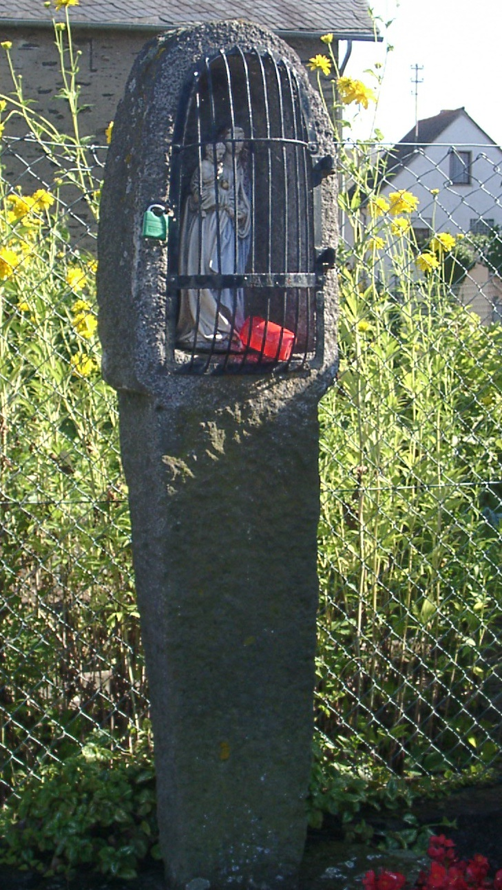 Schöpflöffel in Einig (MYK), Innenansicht